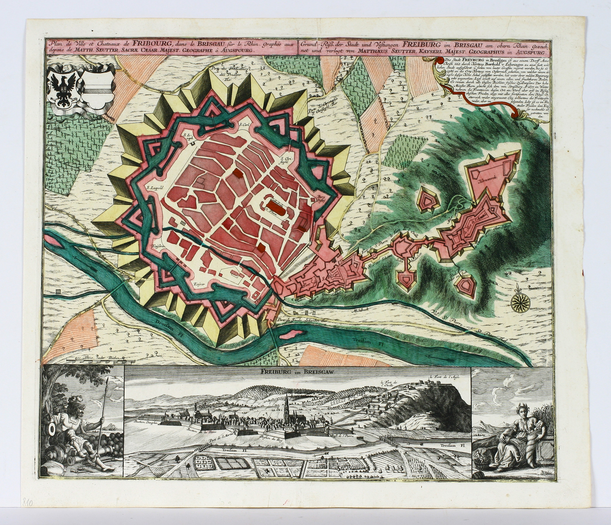 Grund Riß der Stadt und Vestungen Freiburg im Brisgau